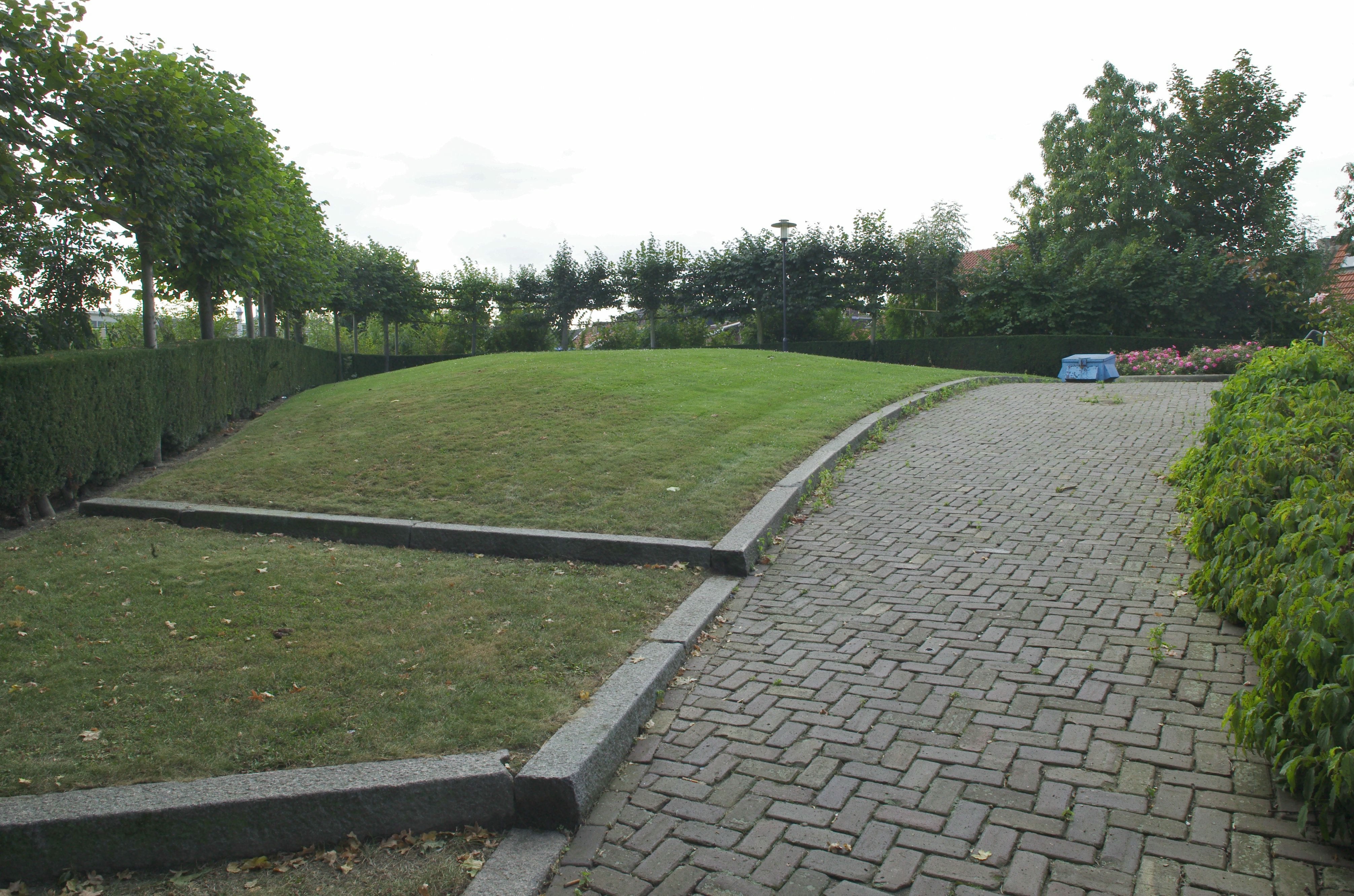 Stadswal: Stadswal Fort Sanderbout (opmerking: Schootsvelden rond de binnenstad van Sittard)